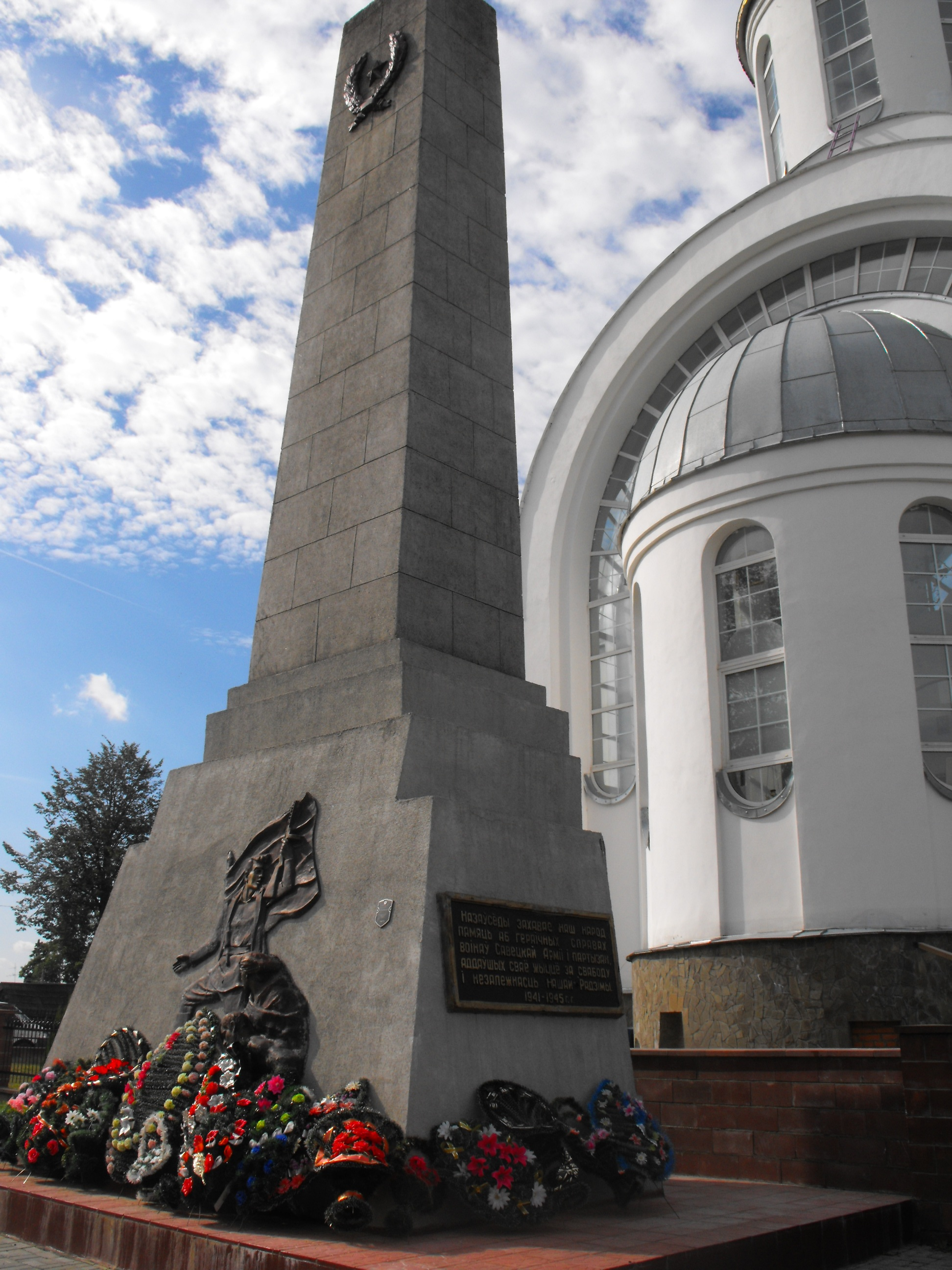 Памятник на братской могиле партизан и советских воинов в Ивенце (возле церкви Святой Евфросиньи). В этой же могиле - прах 10 партизан отряда Зорина, погибших от рук польских националистов деревне Саковщизна при выполнение задания командования отряда 18 ноября 1943 года. Они были похоронены в деревне Дубники Ивенецкого района, а в 1965 году перезахоронены в центре Ивенца. Адрес: Беларусь, Минская область, Воложинский район, г.п. Ивенец, пл. Свободы, д. 3